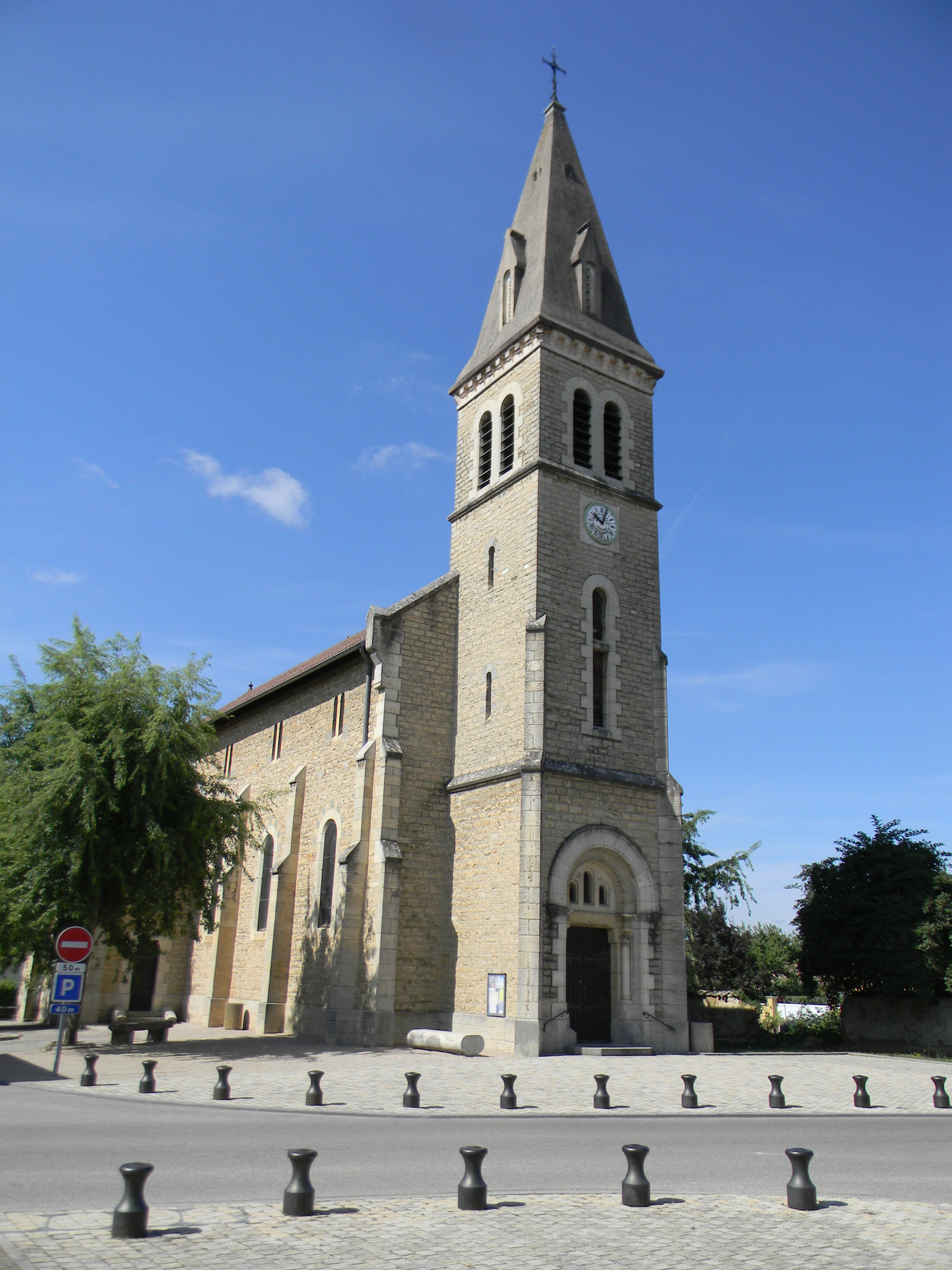 Église de Tignieu-Jameyzieu.